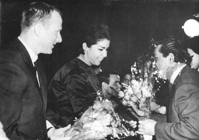 Zentralbild-Bulgarische Fotografie Pu 29.3.1963 Sofia: DDR-Filmwoche in Bulgarien Eine Woche des DDR-Films wurde am 18. März mit "Gewissen im Aufruhr" eröffnet. An der Aufführung des erfolgreichen Fernsehfilms nahm Hans Oliva teil. Der DDR-Delegation, die zu der Filmwoche in der bulgarischen Hauptstadt weilt, gehören außerdem die Schauspielerin Marita Böhme und der Drehbuchautor Wolfgang Kohlhaase an. UBZ. Nach der Aufführung des Films "Gewissen im Aufruhr" im Filmtheater "Dimiter Blagojewa" danken bulgarische Filmschaffende ihren deutschen Freunden (von links): Wolfgang Kohlhaase und Marita Böhme."